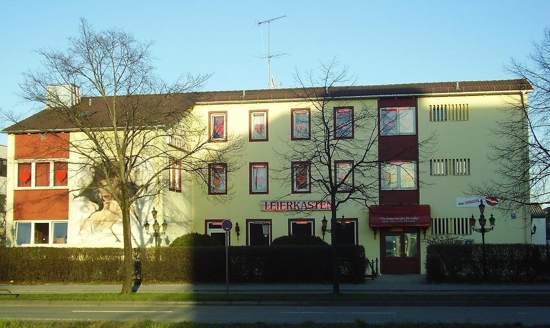 Leierkasten in(Munich (Germany)